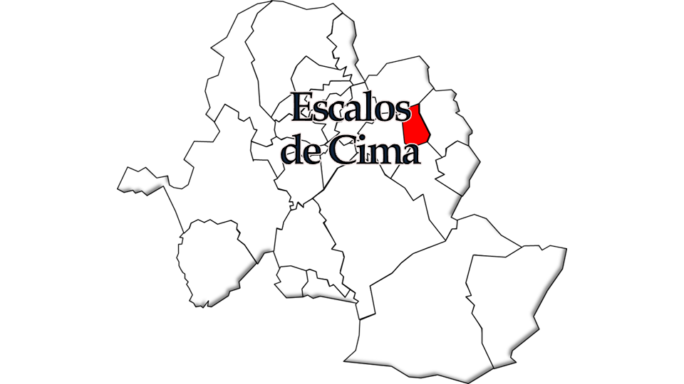 População